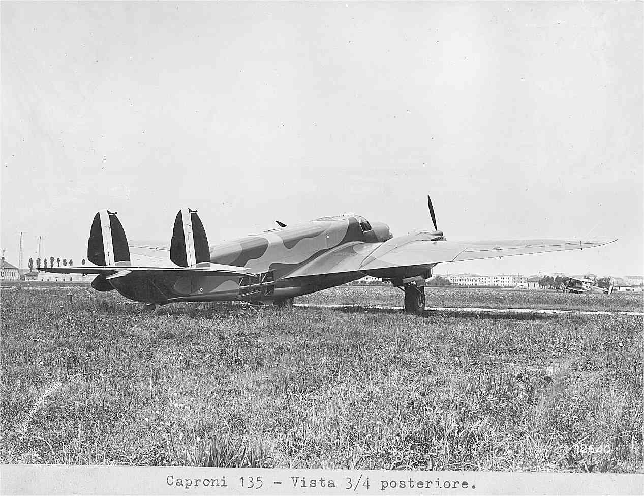 Aeroplano CAPRONI 135 - da bombardamento - 2 MOTORI I.F. ASSO XI Rc - vista posteriore